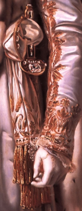 Napoleon, Keizer der Fransen. File:Francois Gerard - Napoleon Ier en costume du Sacre.jpg